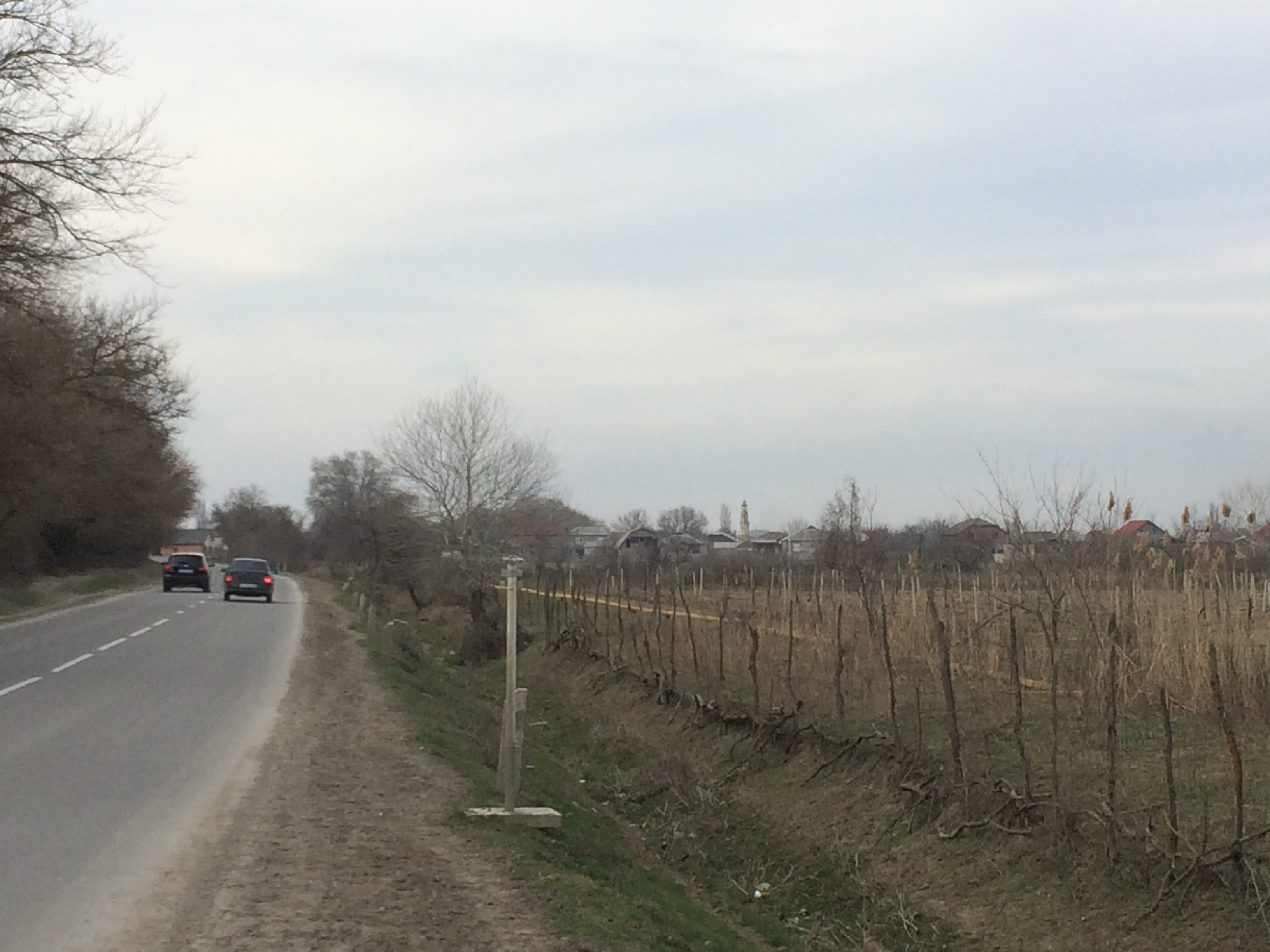 Шаумян